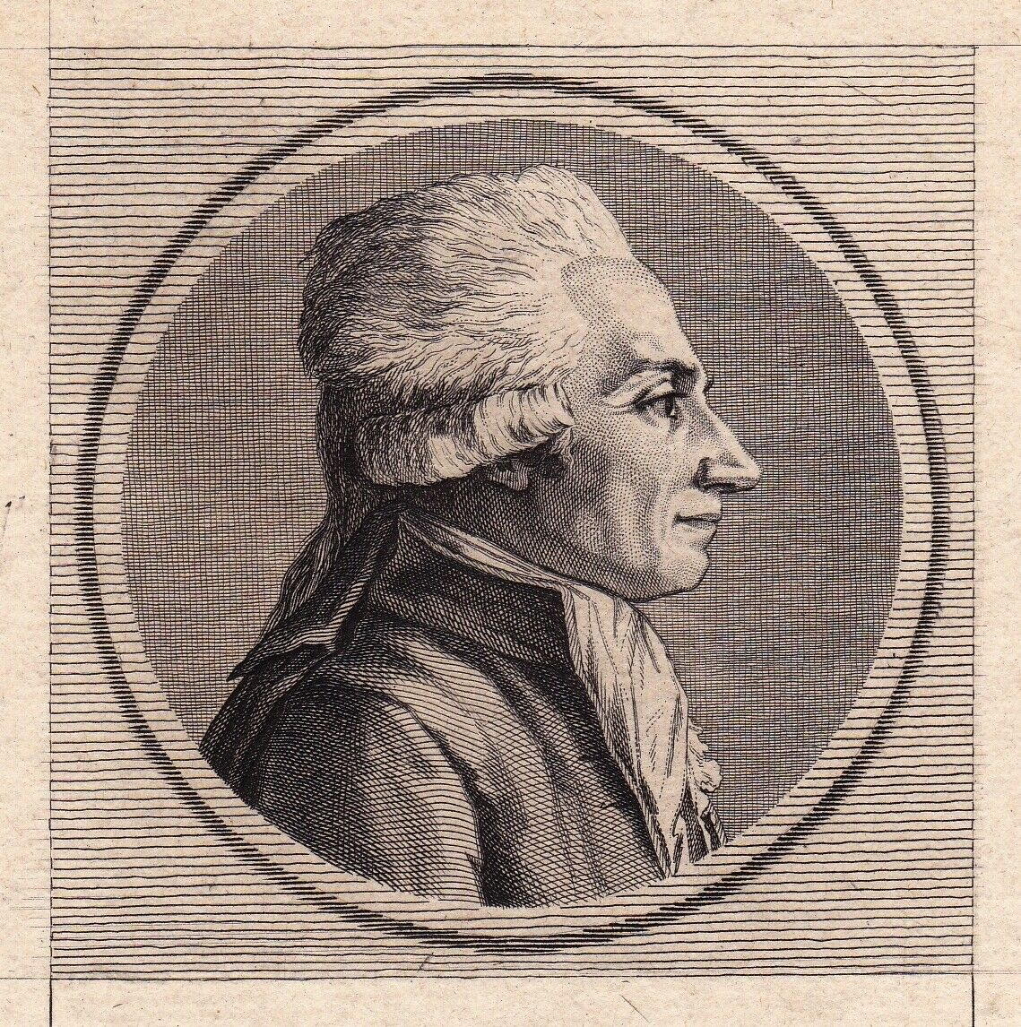 Pourtrait de Louis-Ghislain de Bouteville, exécutée en 1789/1791 par Wilbrode-Magloire-Nicolas Courbe d'après un dessin de Charles Toussaint Labadye